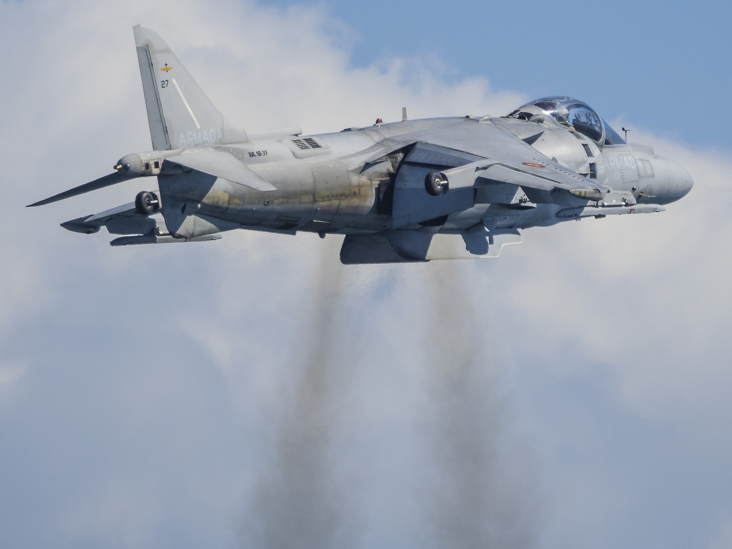 Festa al Cel 2015